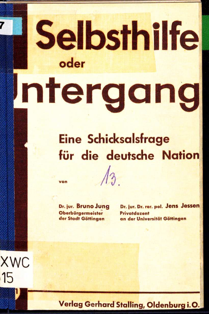 Bruno Jung Jens Jessen Selbsthilfe oder Untergang 1931 Einband